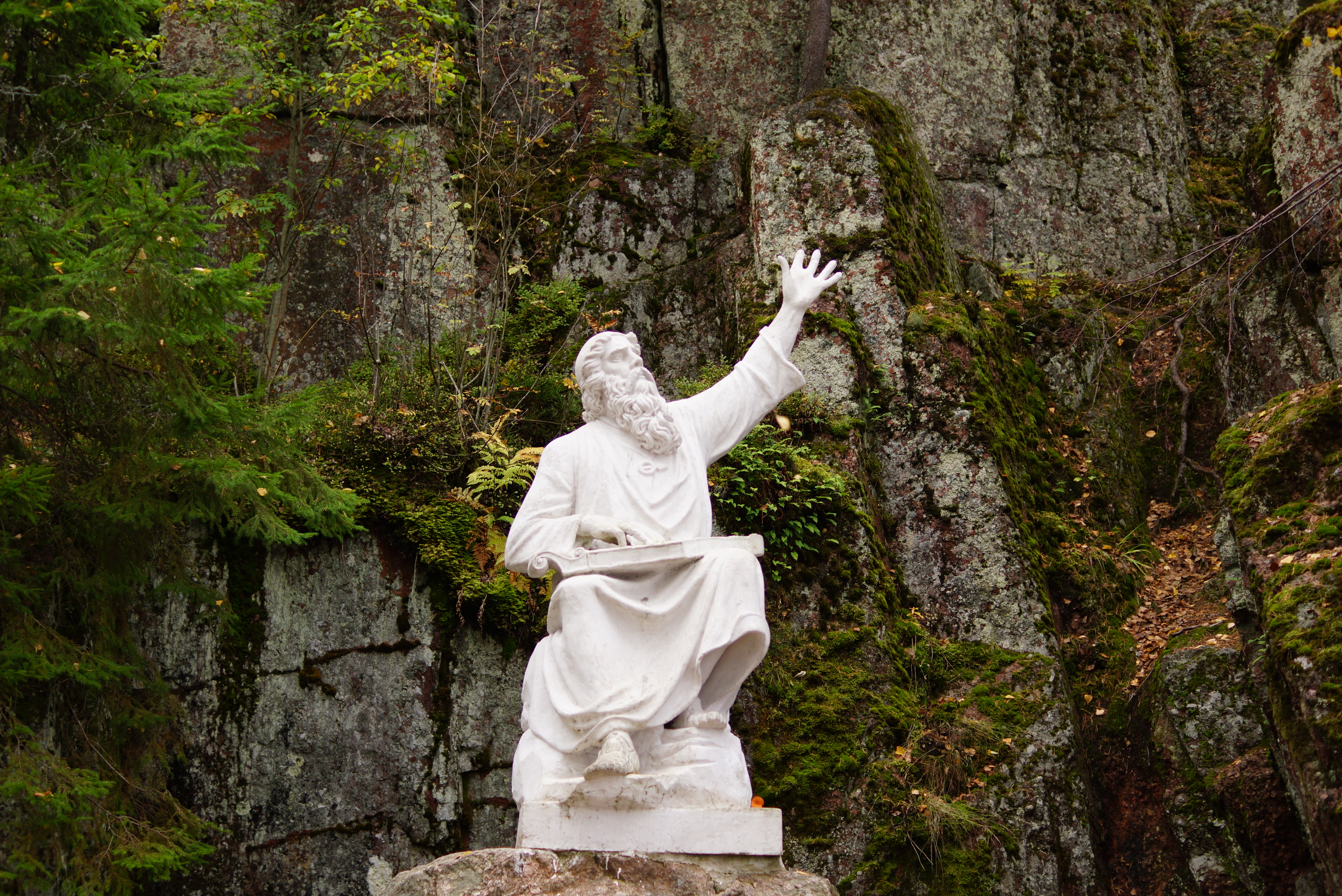 Парк Монрепо: в северной части города на берегу бухты Защитной Выборгского залива, Выборг, Выборгский район, Ленинградская область This image is related to the protected area of Russia number 4710069